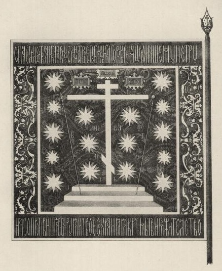 Знамя 1696-1699 г. Text top center: Спаси Господи люди твоя и благослови достояние твое! Победы Благоверному Царю Нашему Петру. Text bottom center: На сопротивныя даруяй твое сохраняя Крестом твоим жительство.